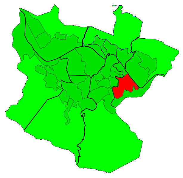 Santutxu.